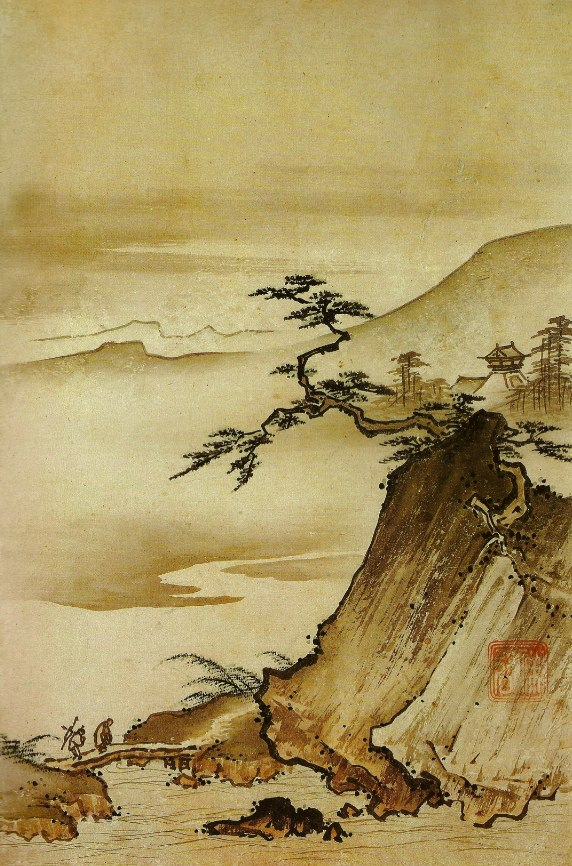 Cloche dans la brume au crépuscule par le peintre japonais Shōkei Ten'yū des XVe et XVIe siècles. Cette peinture est une encre et couleurs sur papier de 36x23 centimètres. Elle est conservée au Musée des beaux-arts Hakutsuru Kōbe.